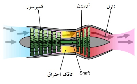 نحوه کار موتور توربوجت - تصویر اصلی توسط یکی از کاربران ویکی‌پدیا به نام Emoscopes ایجاد شده و توضیحات آن توسط reza789 به فارسی ترجمه شده است. آدرس تصویر اصلی با توضیحات انگلیسی